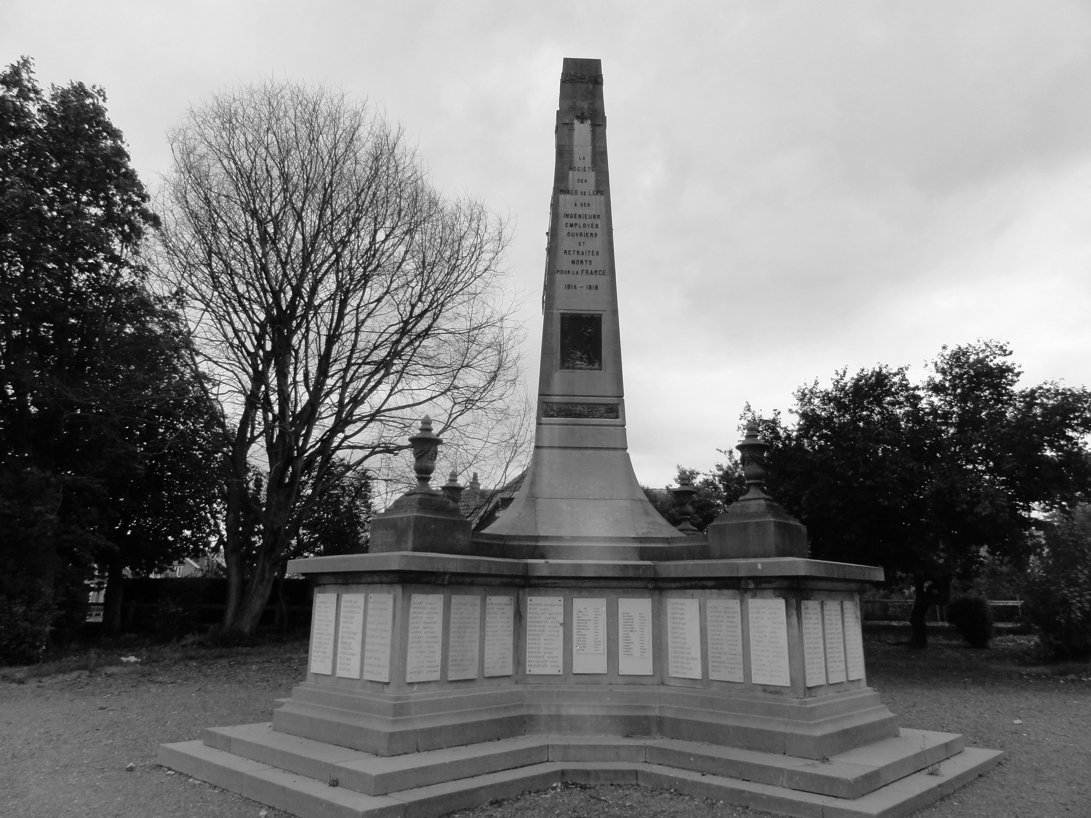 Monument aux morts de la Compagnie des mines de Lens, Lens, Pas-de-Calais, Nord-Pas-de-Calais, France. .